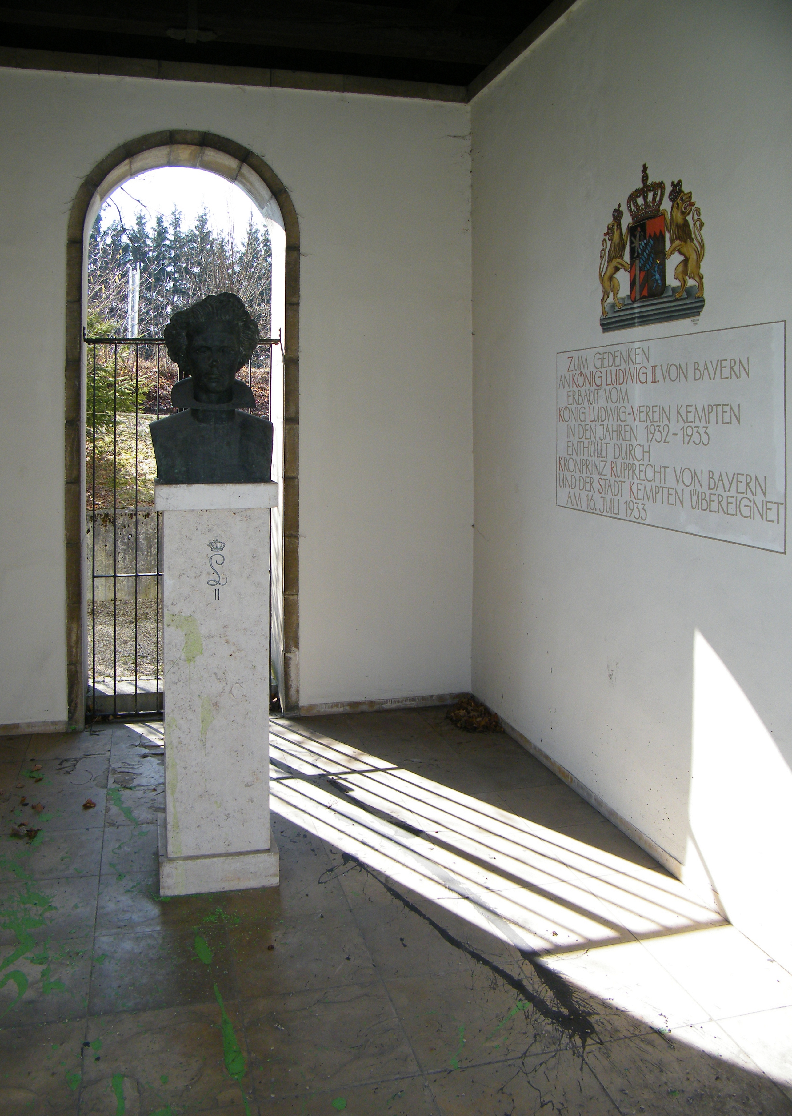 Oberen Illerbrücken in Kempten.